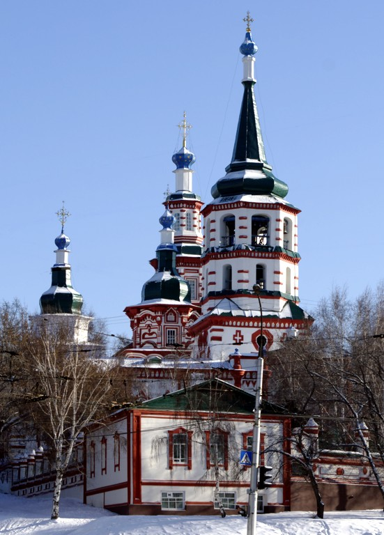 Крестовоздвиженская церковь